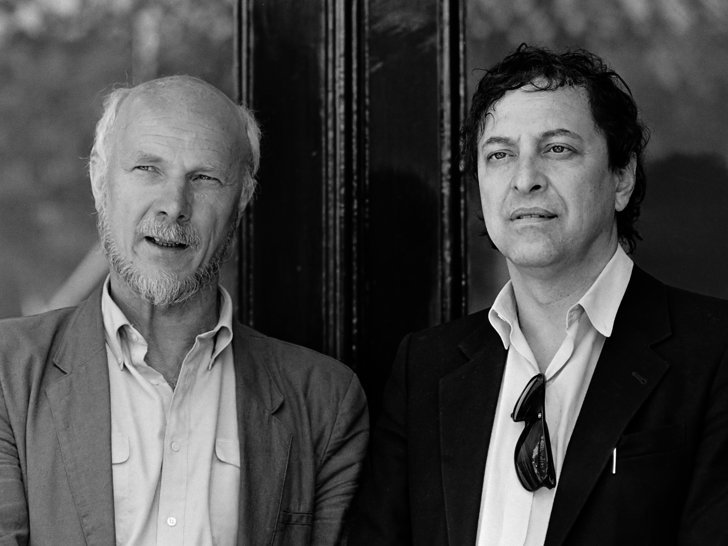 Wereldpremiere van opera Naima op 7 juni in Carre; links Theo Loevendie en Lodewijk de Boer (regie en scenario) 4 juni 1985